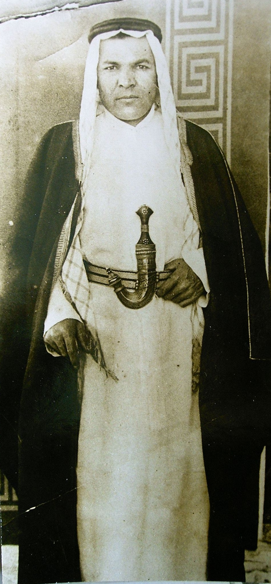 Полномочный представитель СССР в Йемене и Саудовской Аравии К.А.Хакимов в арабской национальной одежде с арабским ножом Джамбия.